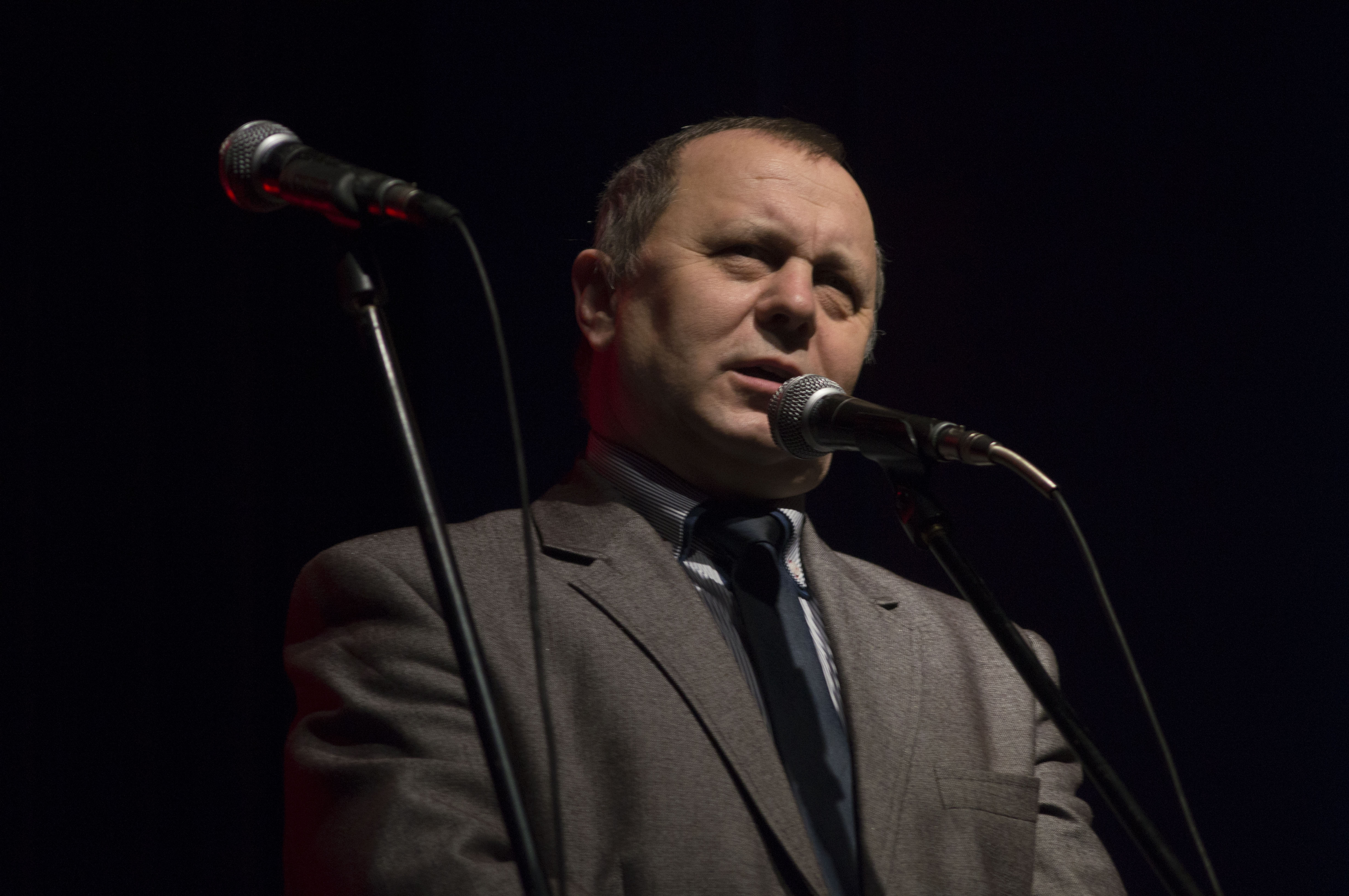 Grzegorz Stasiak, kabareciarz.